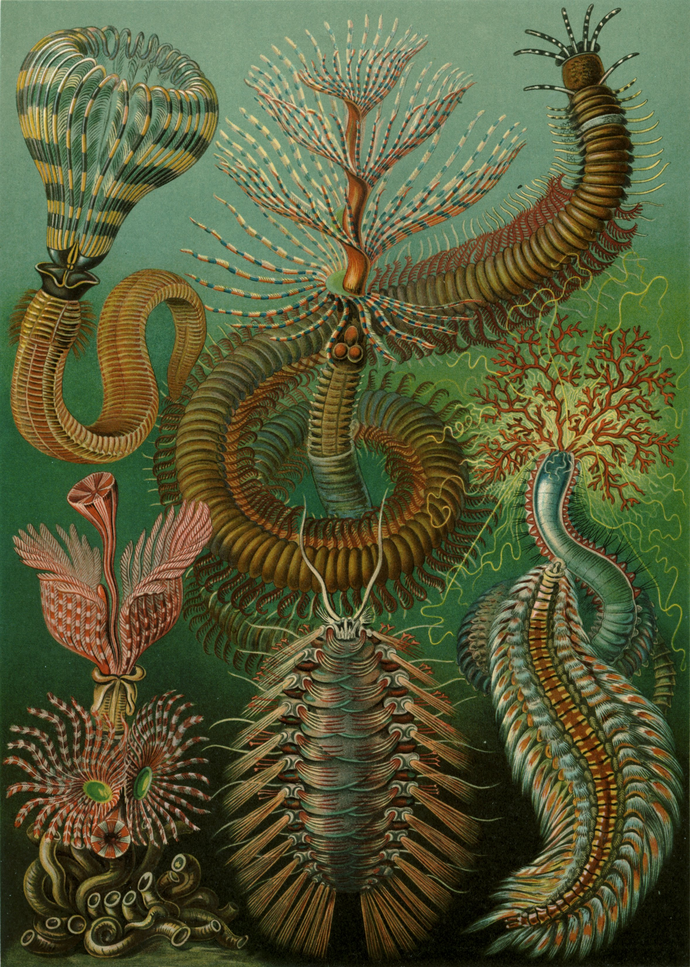 See here for index to numbers. Sabella spectabilis (Grube) = Sabellastarte indica (Savigny, 1822) Serpula contortuplicata (Linné) = Hydroides norvegicus Gunnerus, 1768 Spirographis spallanzanii (Viviani) = Sabella spallanzanii (Gmelin, 1791) Terebella emmalina (Quatrefages) = Pista cretacea (Grube, 1860) Eunice magnifica (Quatrefages) = Eunice magnifica Grube, 1866 Hermione hystricella (Quatrefages) = Hermione hystricella Milne-Edwards in Cuvier, 1836 Cloëia euglochis (Ehlers) = Chloeia viridis Schmarda, 1861